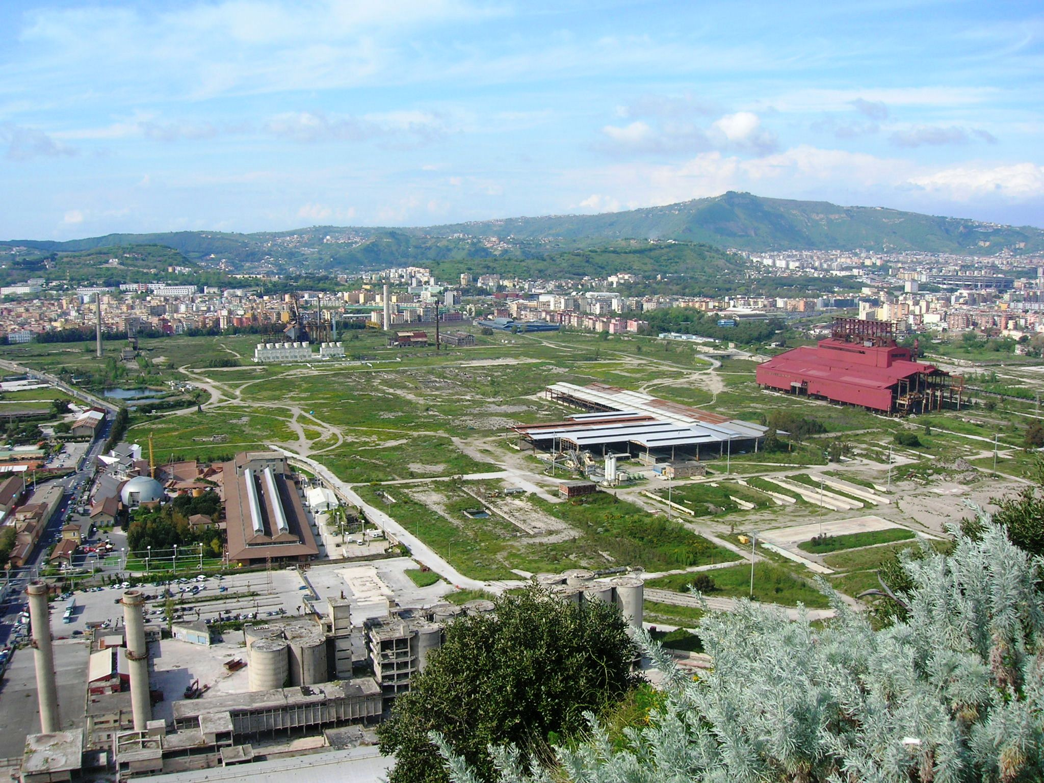 L'area dell'ex Italsider di Bagnoli